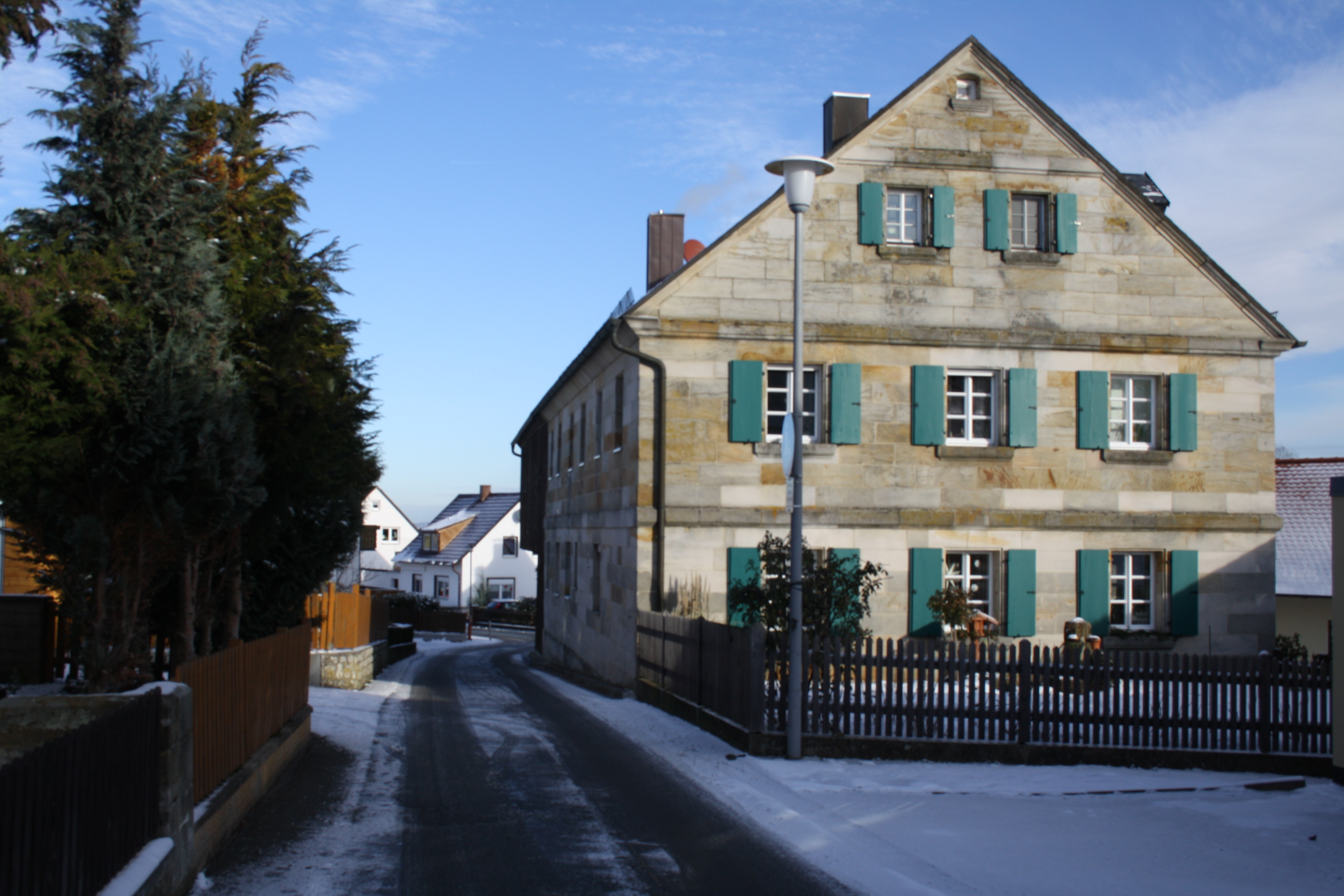 Mittelstraße in Unternschreez bei Bayreuth